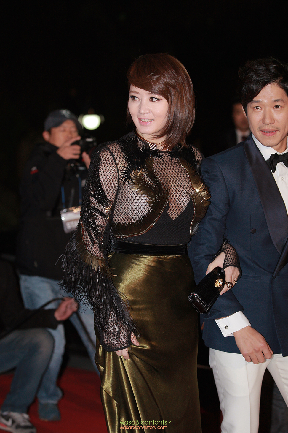 제34회 청룡영화상